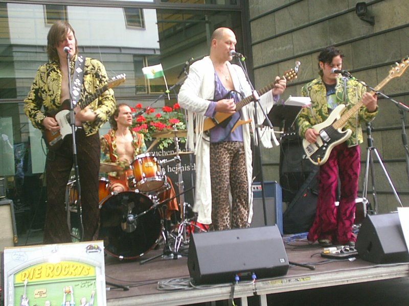 Konzert der Dresdner Musikgruppe Die Rockys im Regierungsviertel